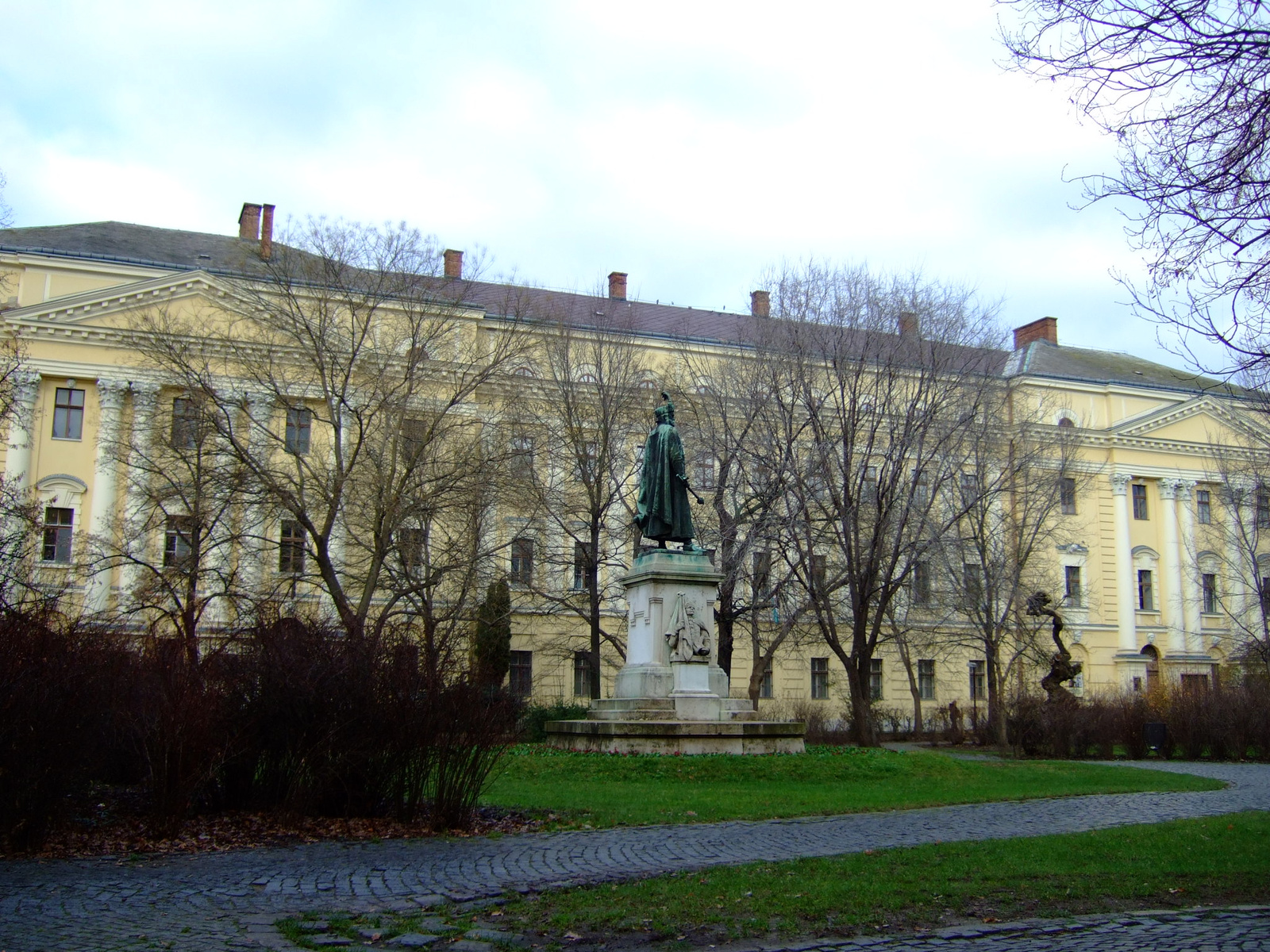 Ref. kollégium (Debrecen, Kálvin tér) This is a photo of a monument in Hungary. Identifier: 5236